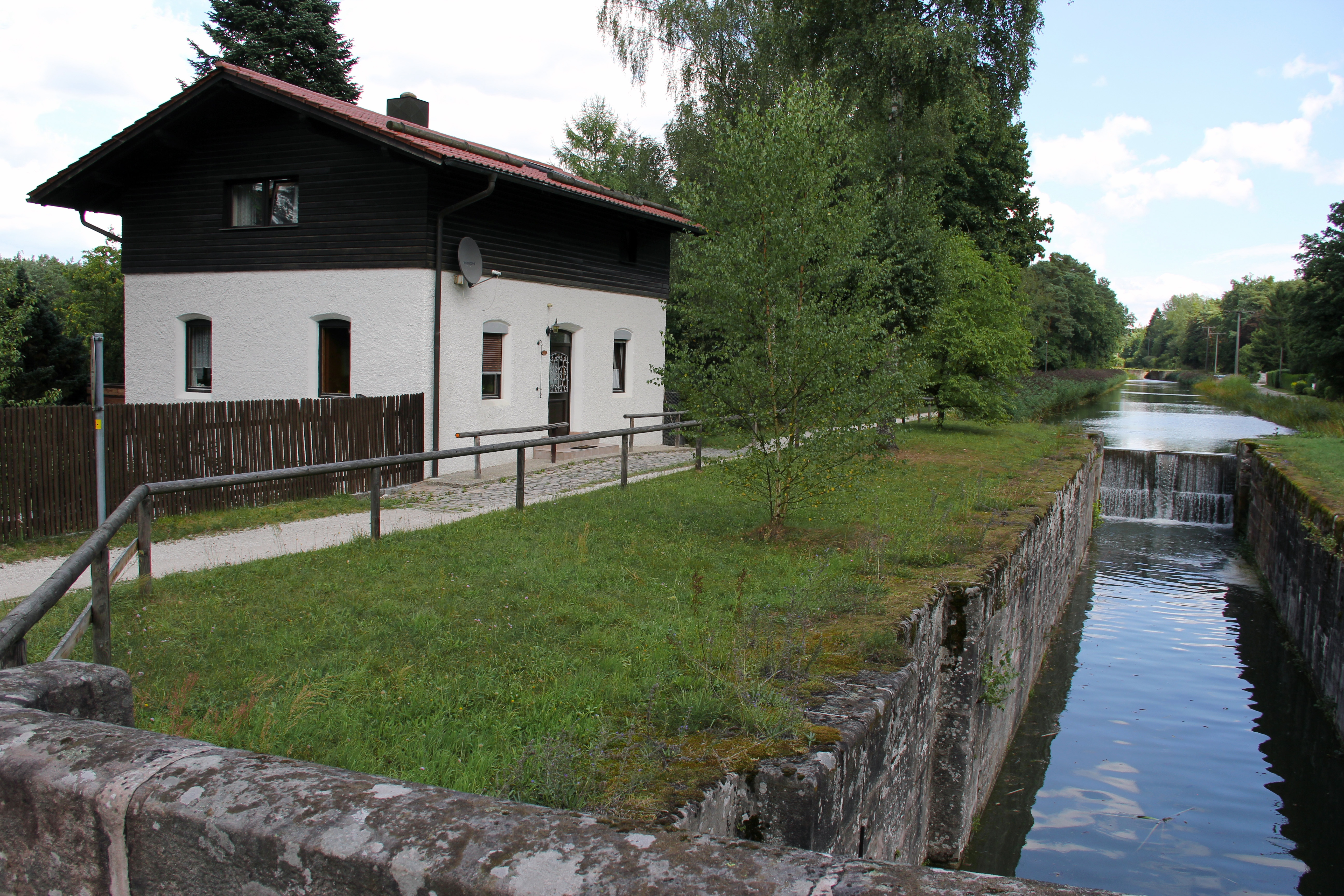 Schleuse 43, Ludwig-Donau-Main-Kanal